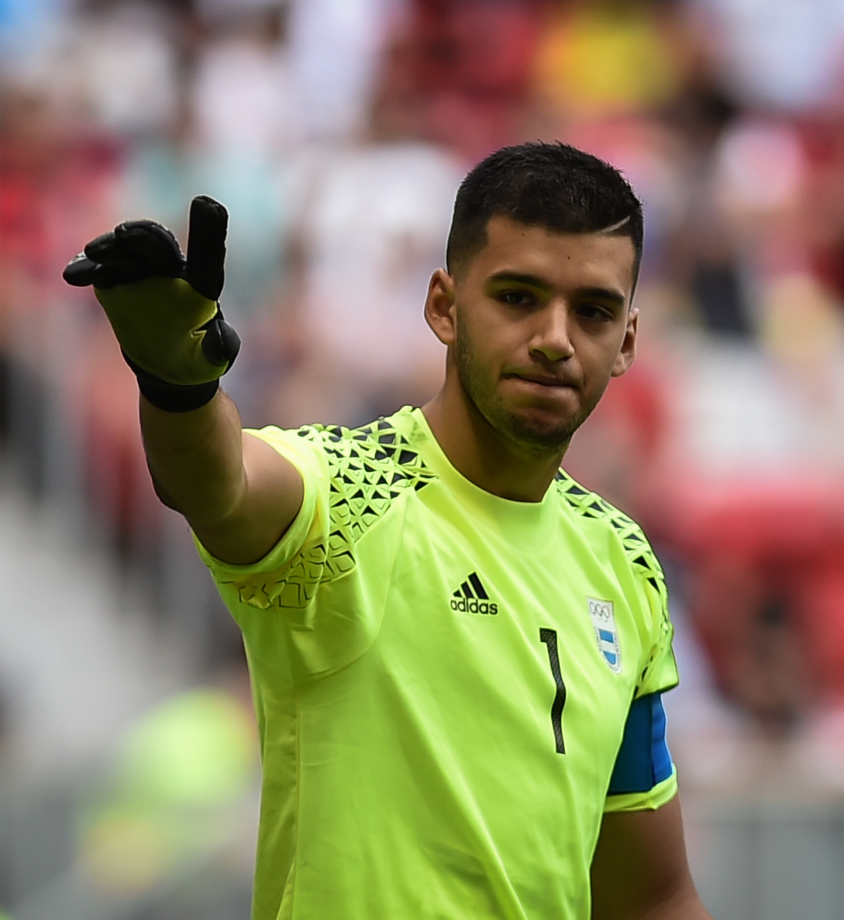 Estádio Nacional de Brasília Mané Garrincha, Brasília, DF, Brasil, 10/8/2016. Argentina e Honduras jogam nesta quarta-feira (10), no Estádio Mané Garrincha, pelo grupo D do futebol masculino nas Olimpíadas 2016.